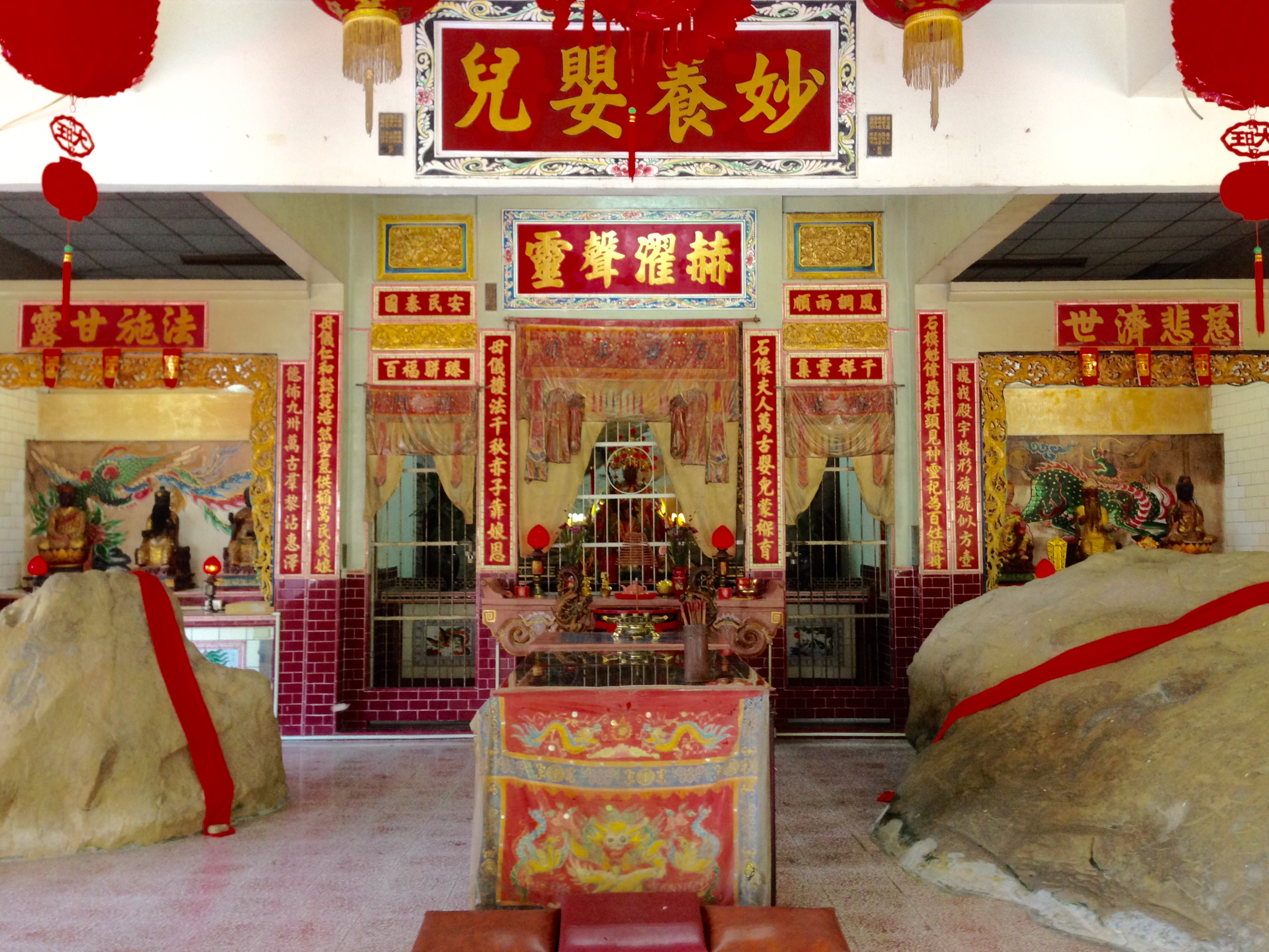 羌仔寮石母宮二樓殿內